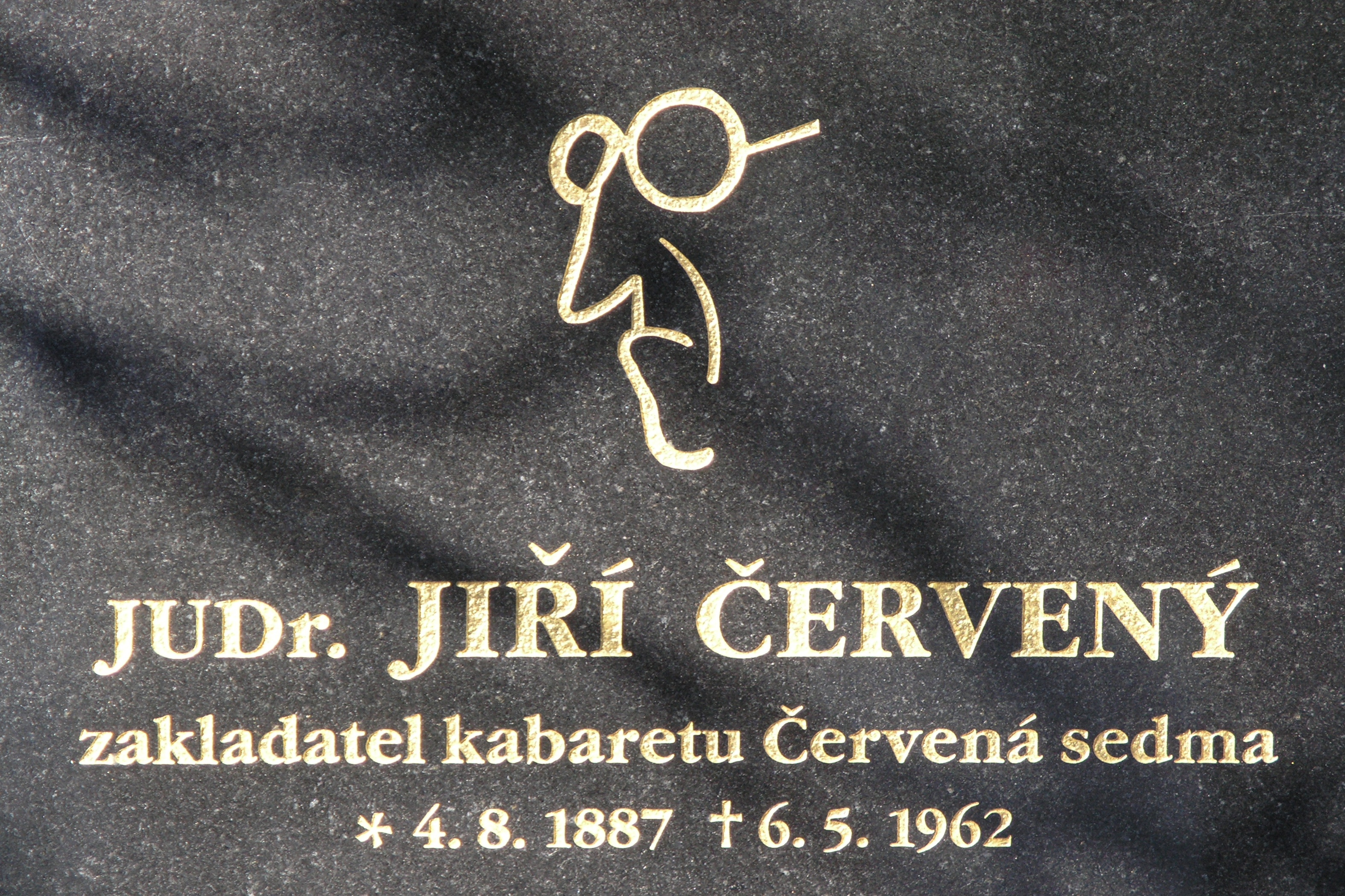 Vyšehradský hřbitov - Jiří Červený